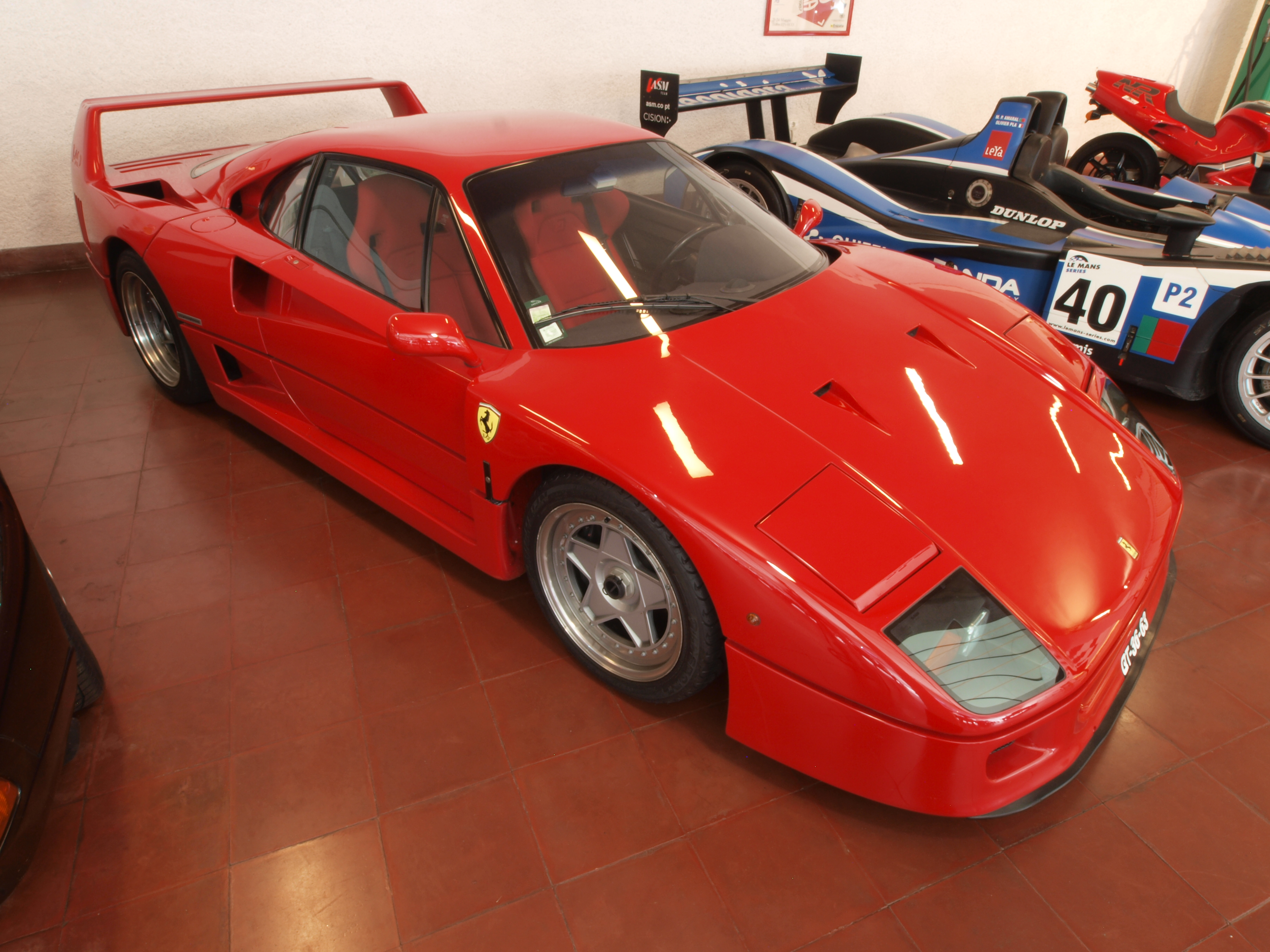 Photographed at the Caramulo museum, 'Museu do Caramulo', Caramulo, Portugal. OLYMPUS DIGITAL CAMERA